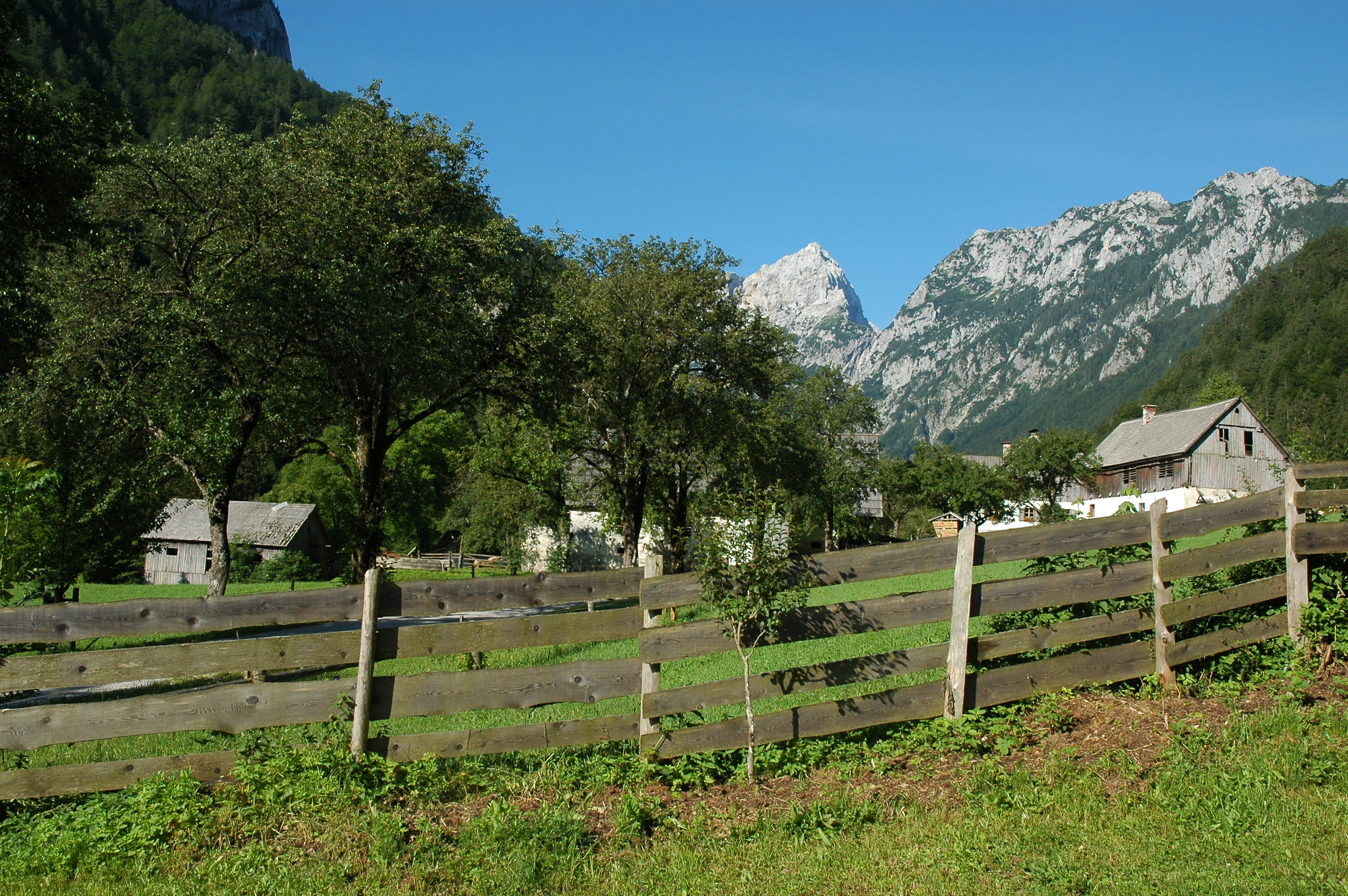 Robanov Kot,village in Slovenia